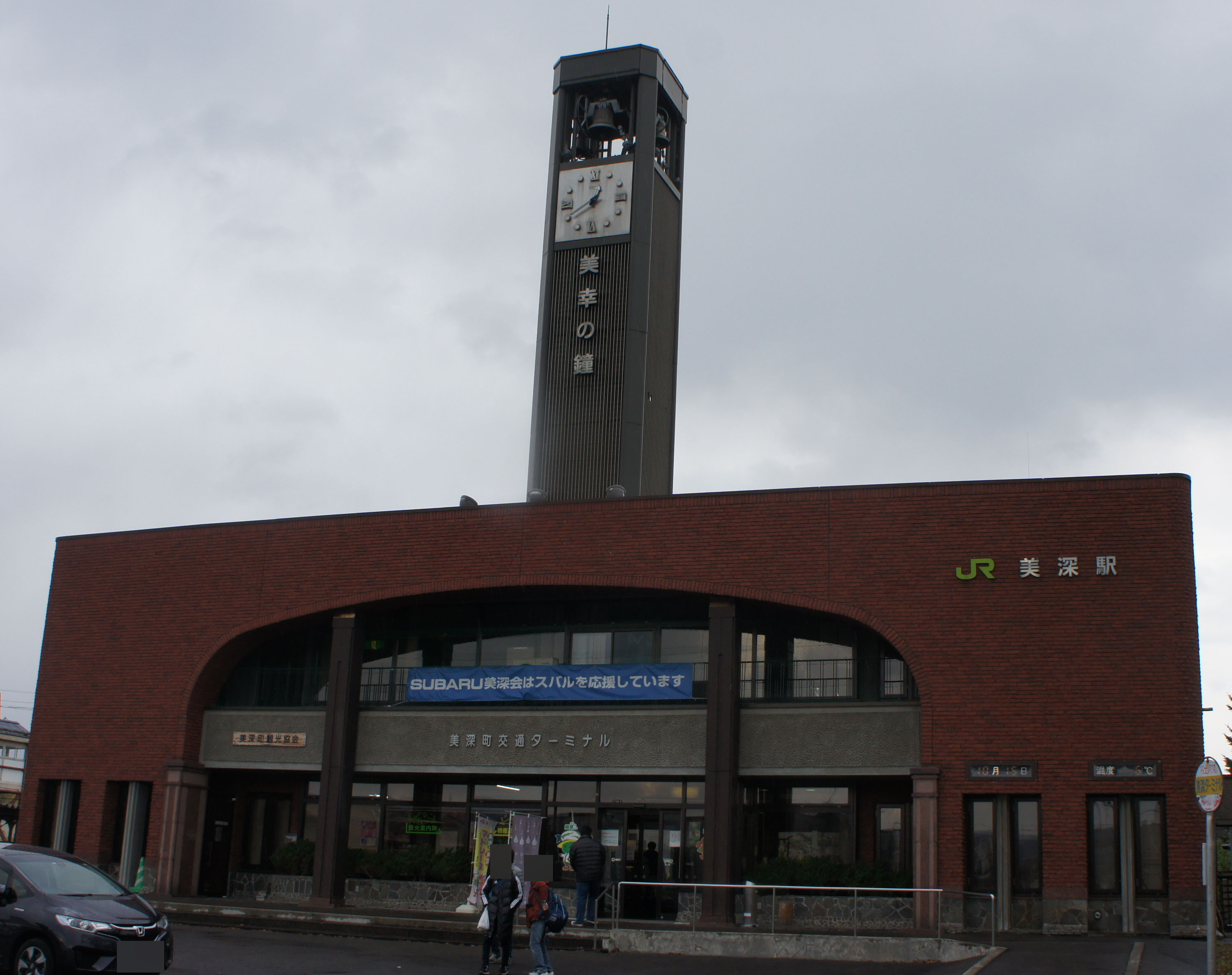 JR宗谷本線・美深駅の駅舎 Sony NEX-3